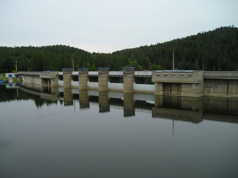 Vodní nádrž Kružberk